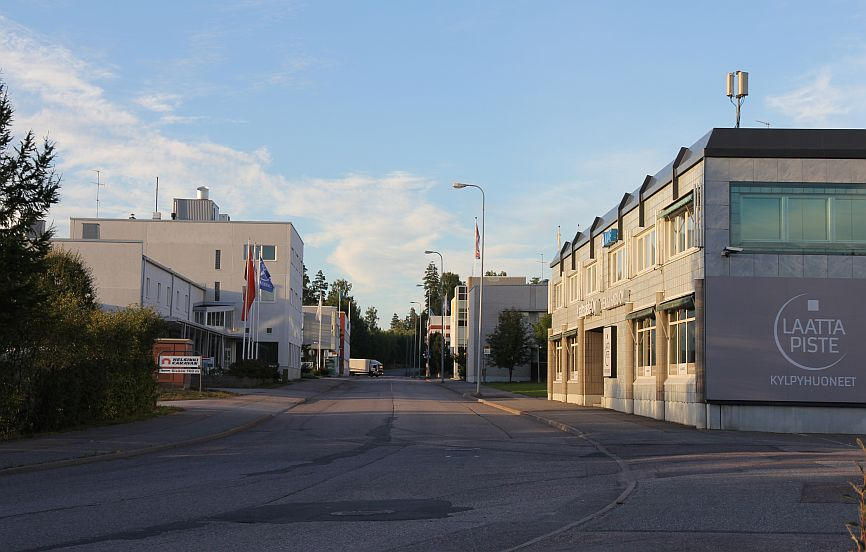 Mestarintietä, Vantaan Piispankylän teollisuusalue. Huom: Muista säilyttää viittaus kuvaajaan, mikäli käytät kuvaa.